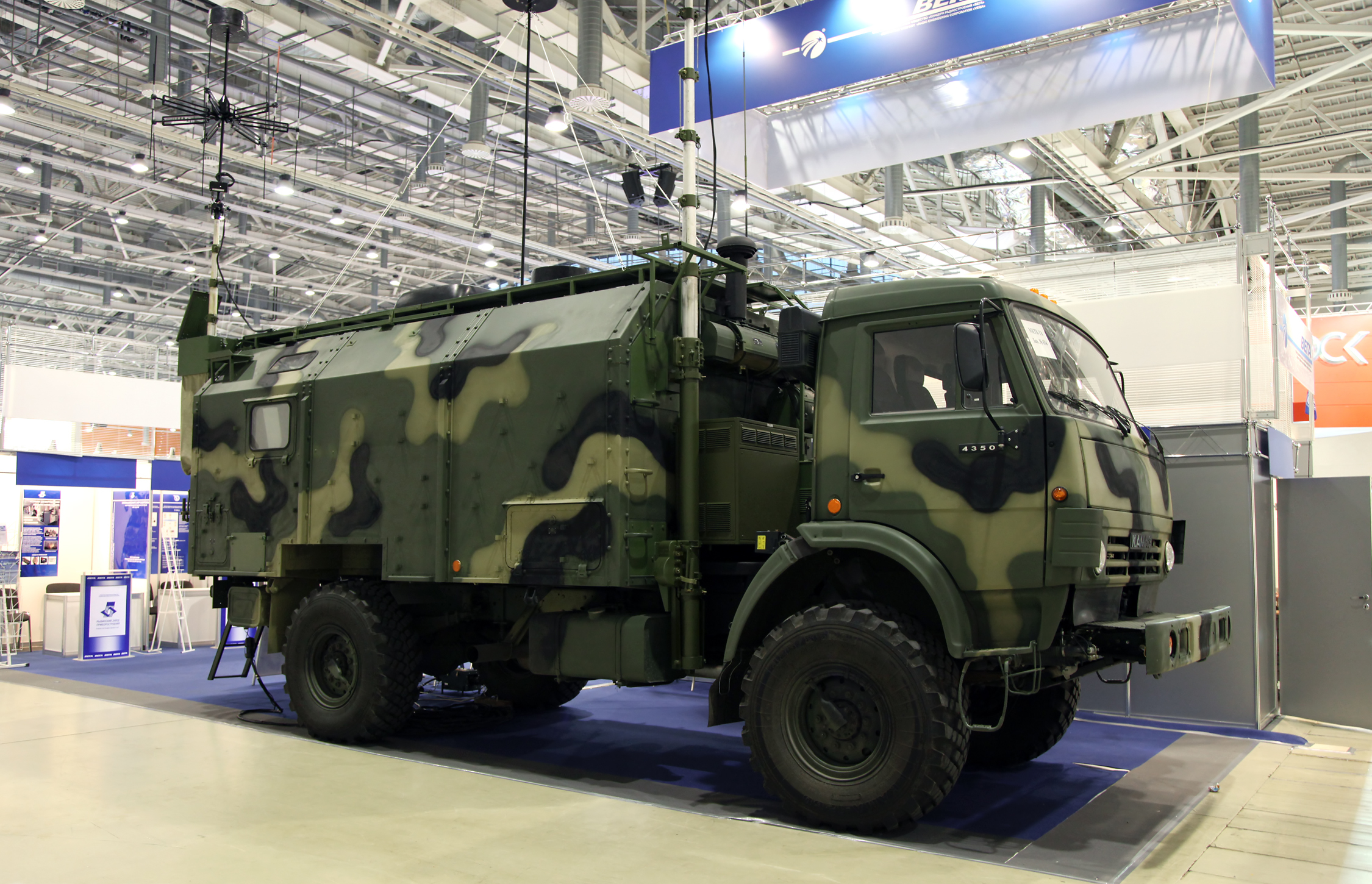 Мобильный автоматизированный комплекс МКТК-1А Дзюдоист (MKTK-1A Judoist ECM vehicle)